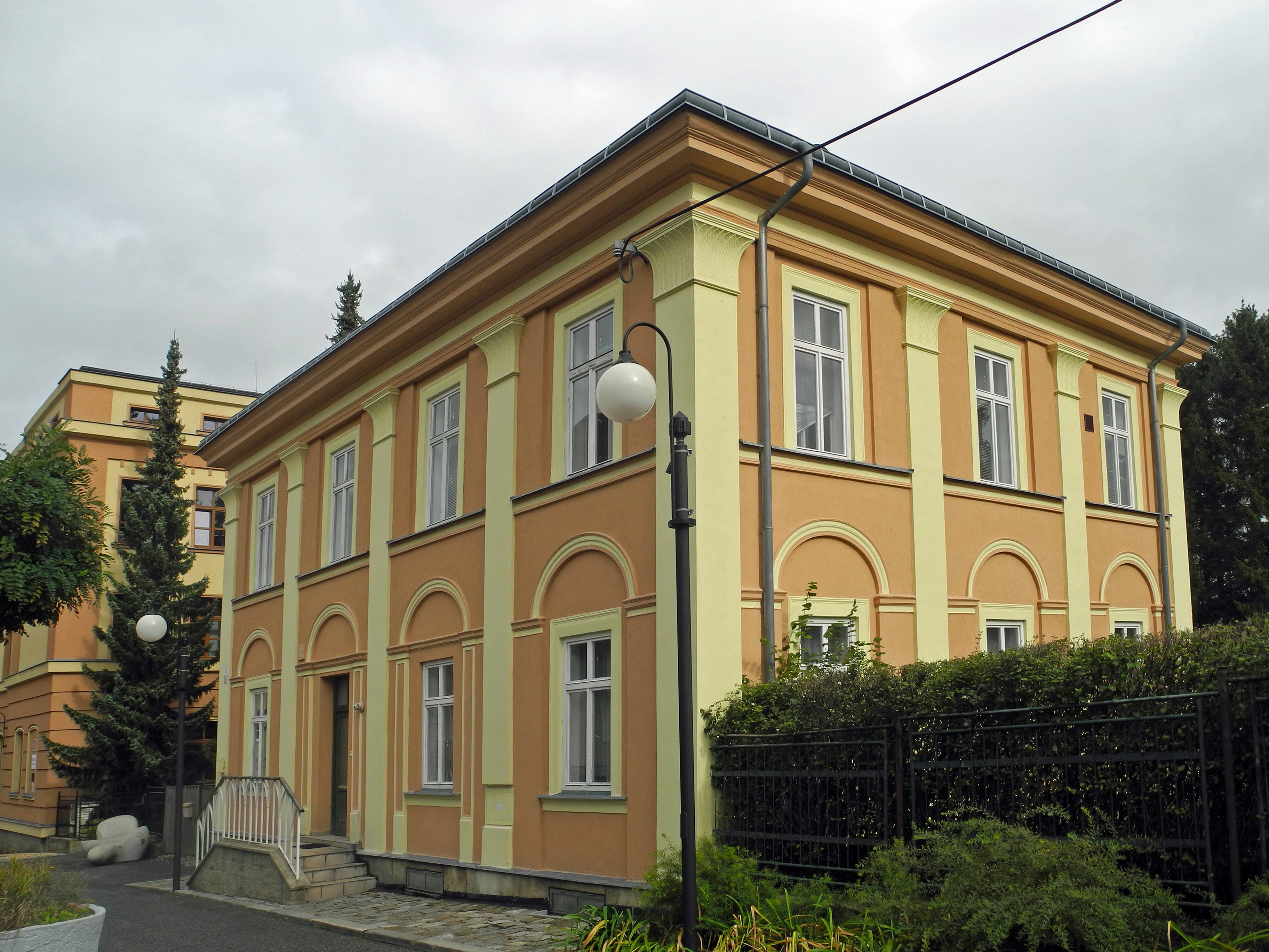 Wohnhaus in Schönlinde – Krásná Lípa, Komenského 480/7, ehem. Hielle & Wünsche